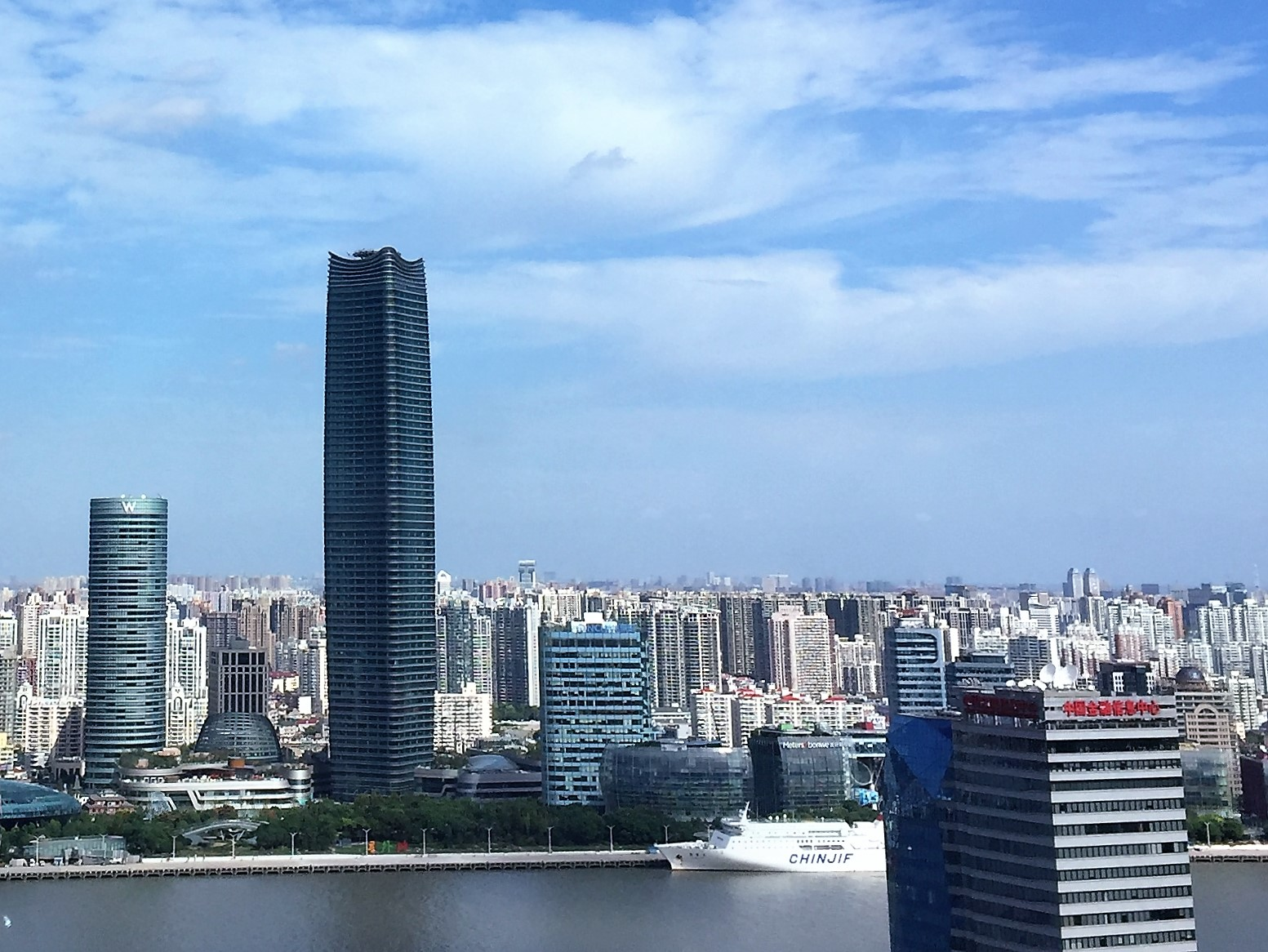 上海虹口北外滩